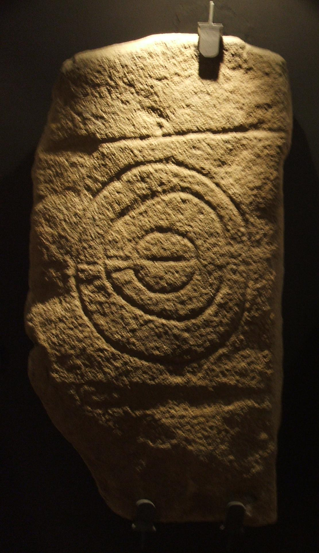 En Robledillo de Trujillo (Cáceres) se halló una estela de granito decorada con grabados de escudo, espada y lanza. Está datada en la Edad del Bronce (siglos IX-VIII aC.)